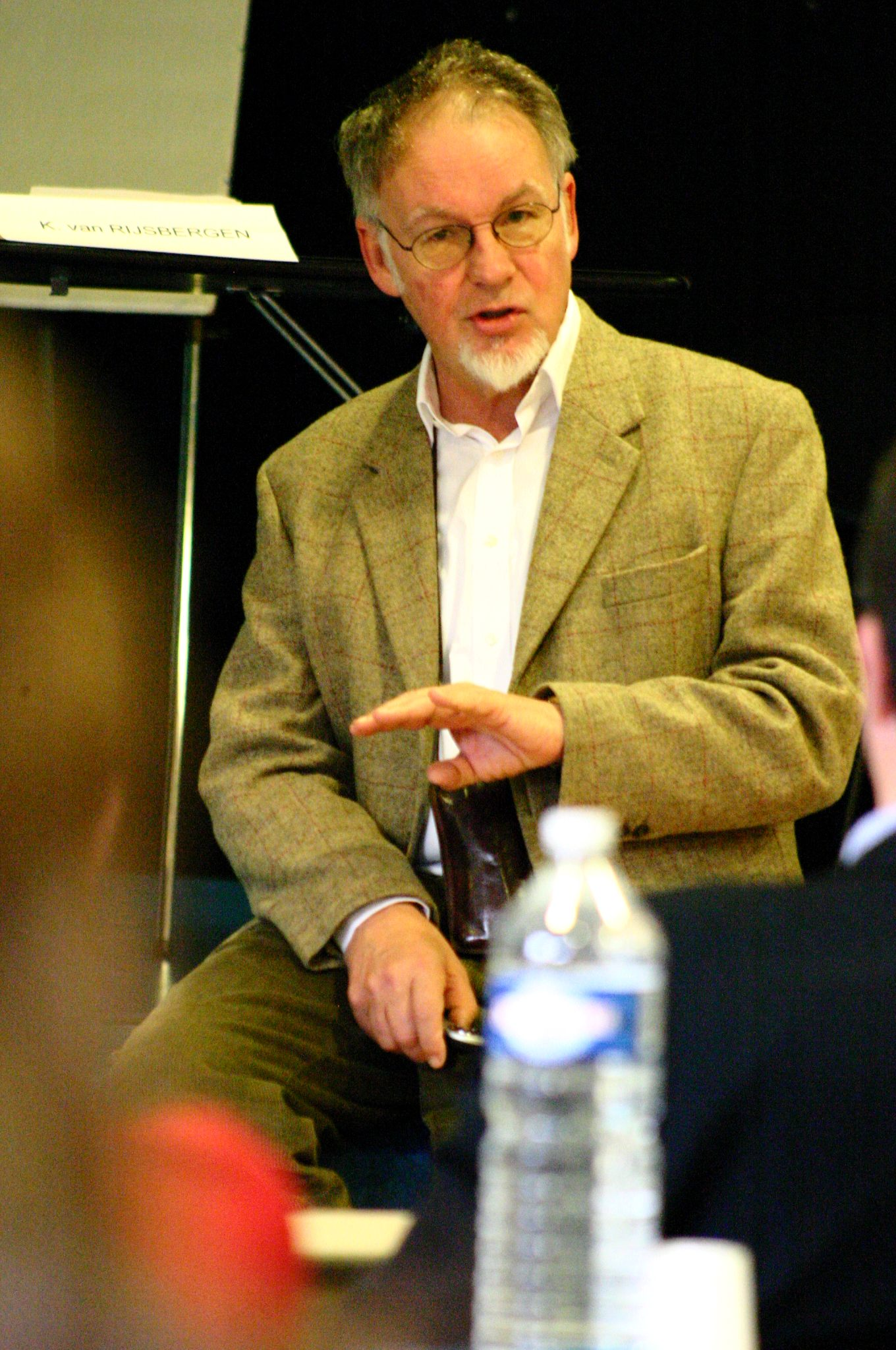 C. J. van Rijsbergen